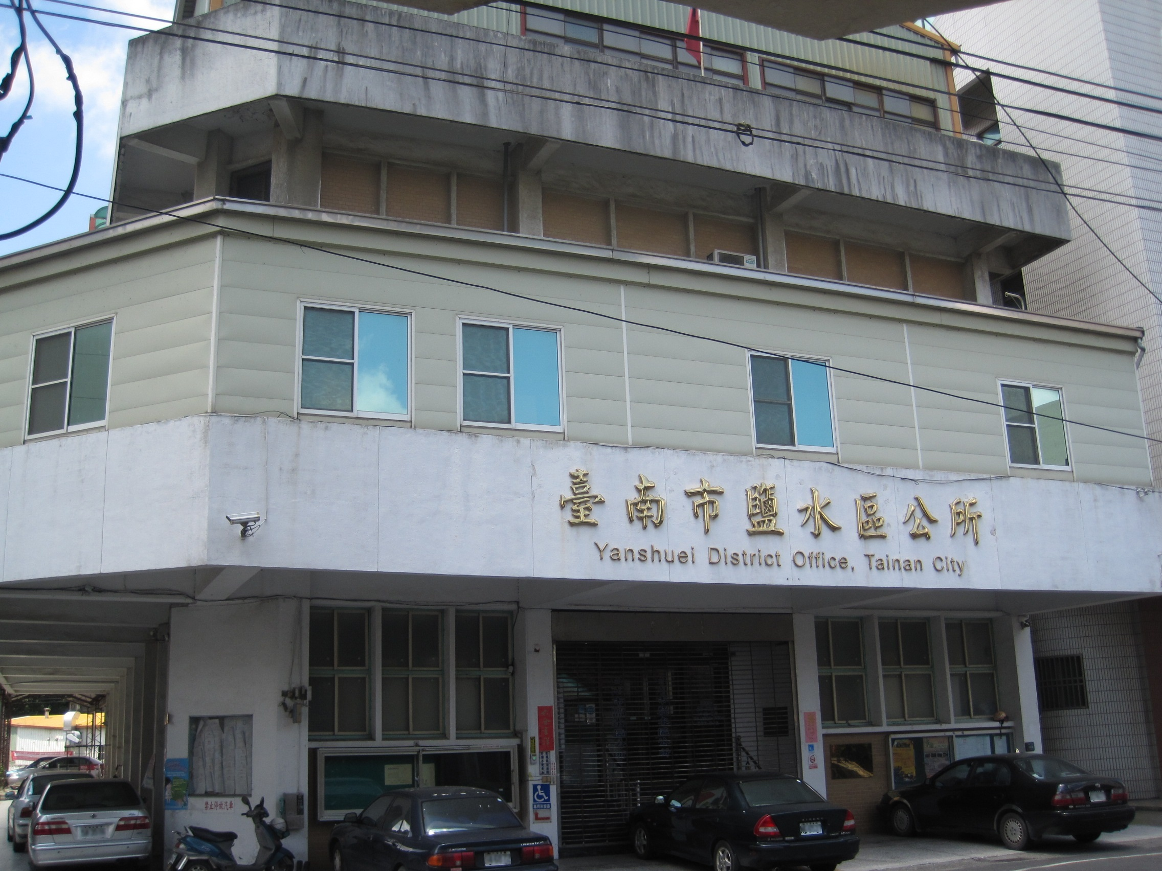 臺南市鹽水區公所